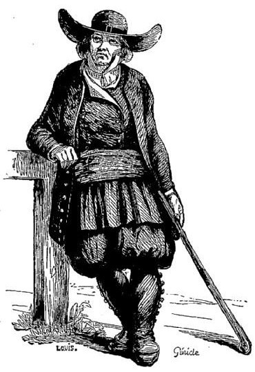 Paysan des environs de Morlaix vers 1854 (dessin de Geniole, Les Français peints par eux-mêmes)